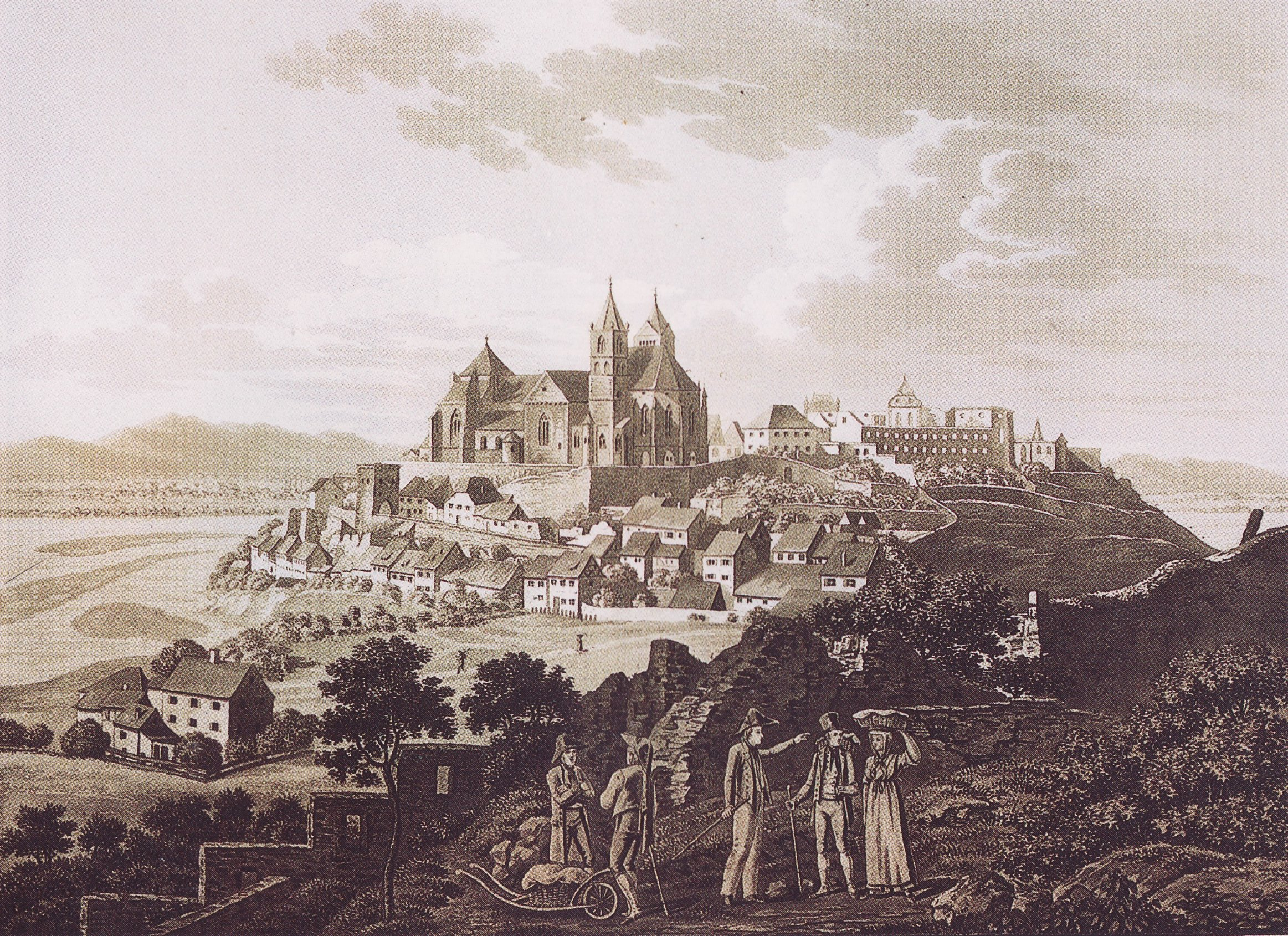 Stahlstich von Wilh. Joh. Esaias Nilson nach einer Zeichnung von Rudolf Follenweider (um 1830)